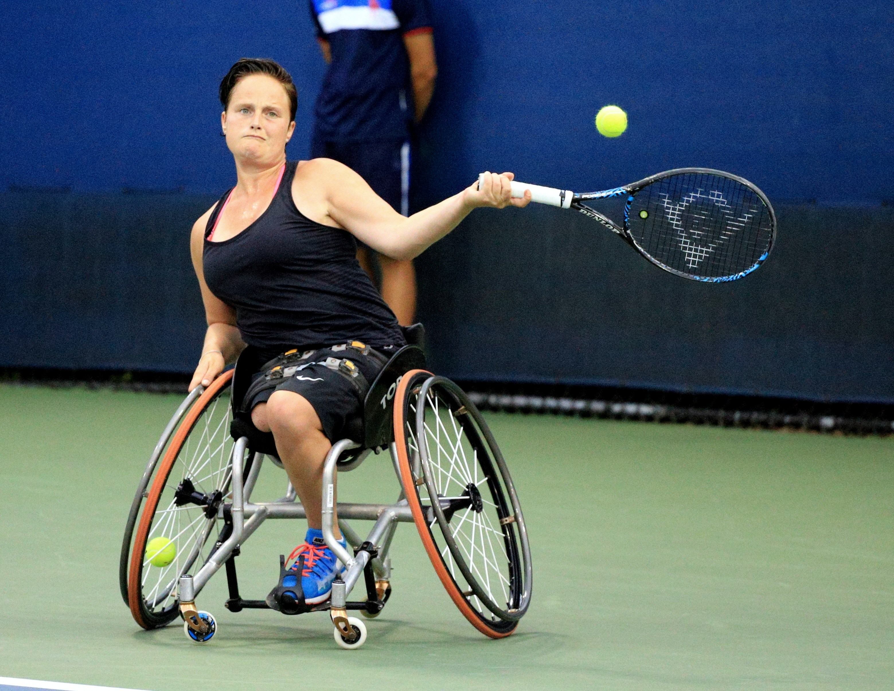 Aniek van Koot at the 2015 US Open